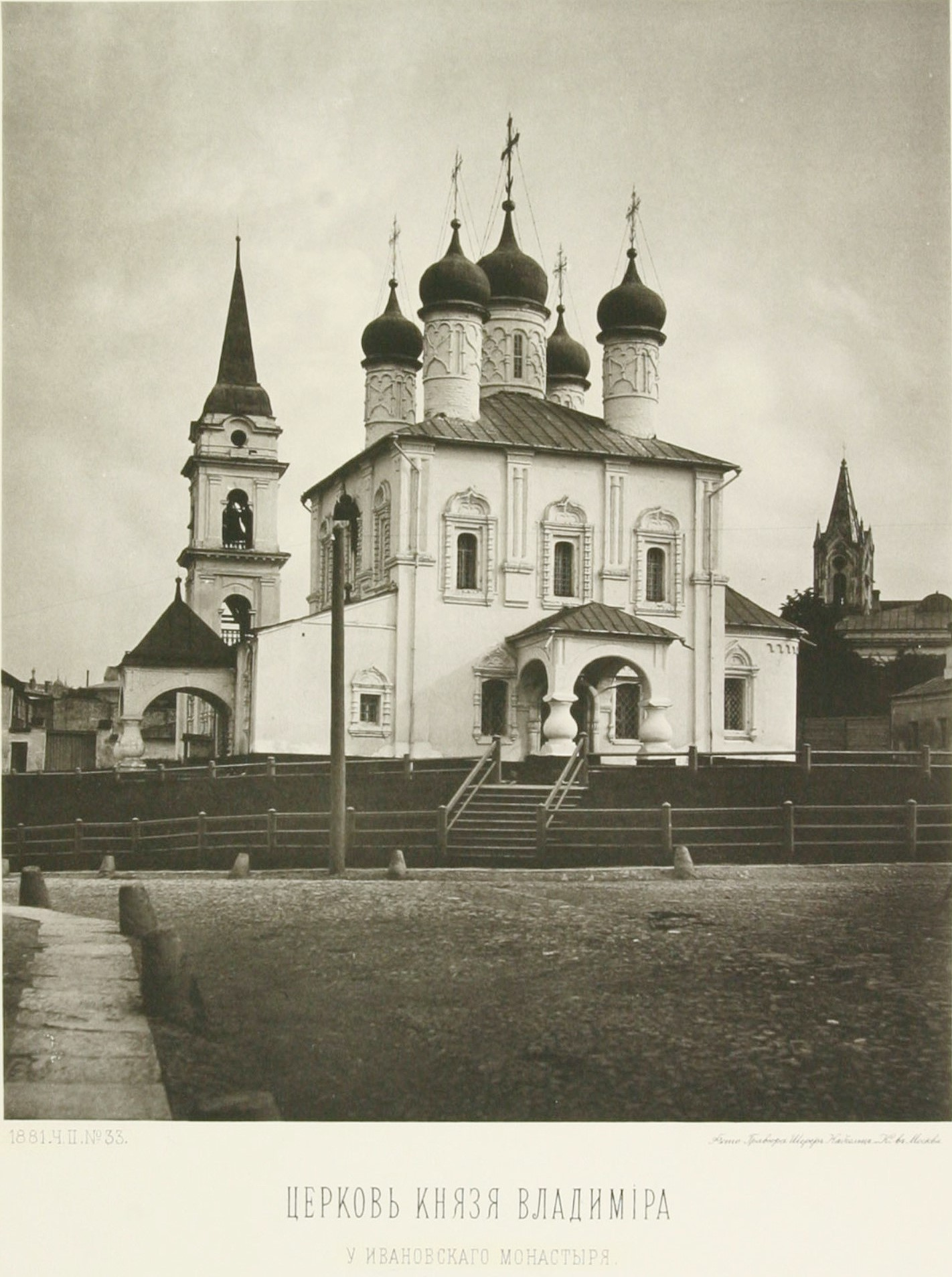 Храм равноапостольного князя Владимира в Старых Садех